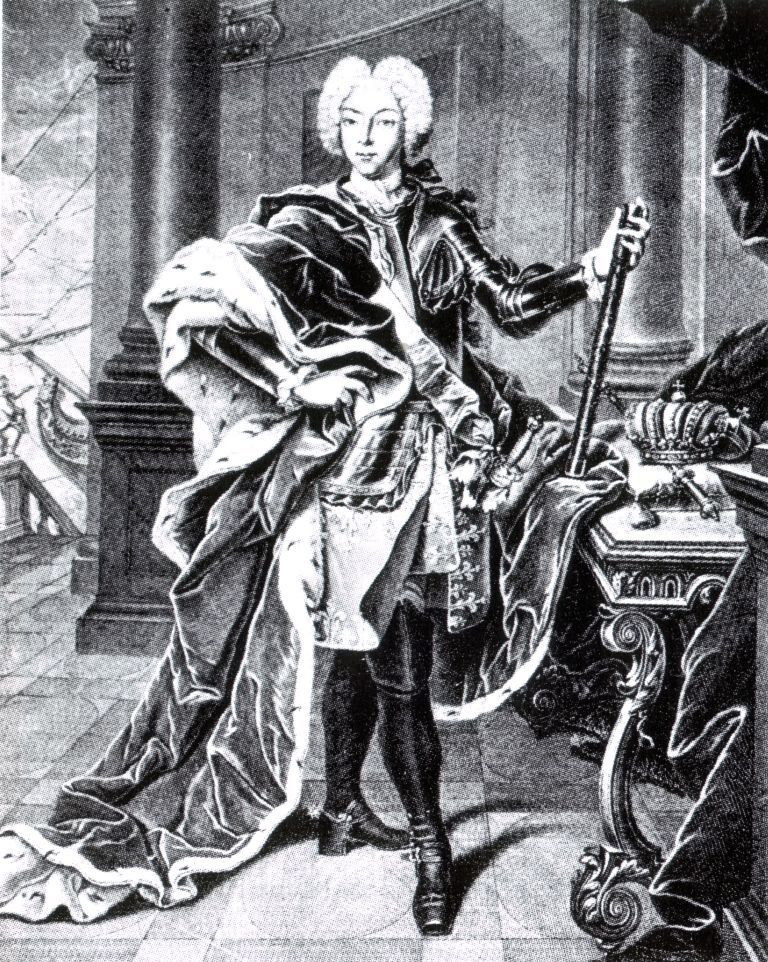 Peter II. Zar von Russland, Enkel Peters des Großen Urheberrecht erloschen